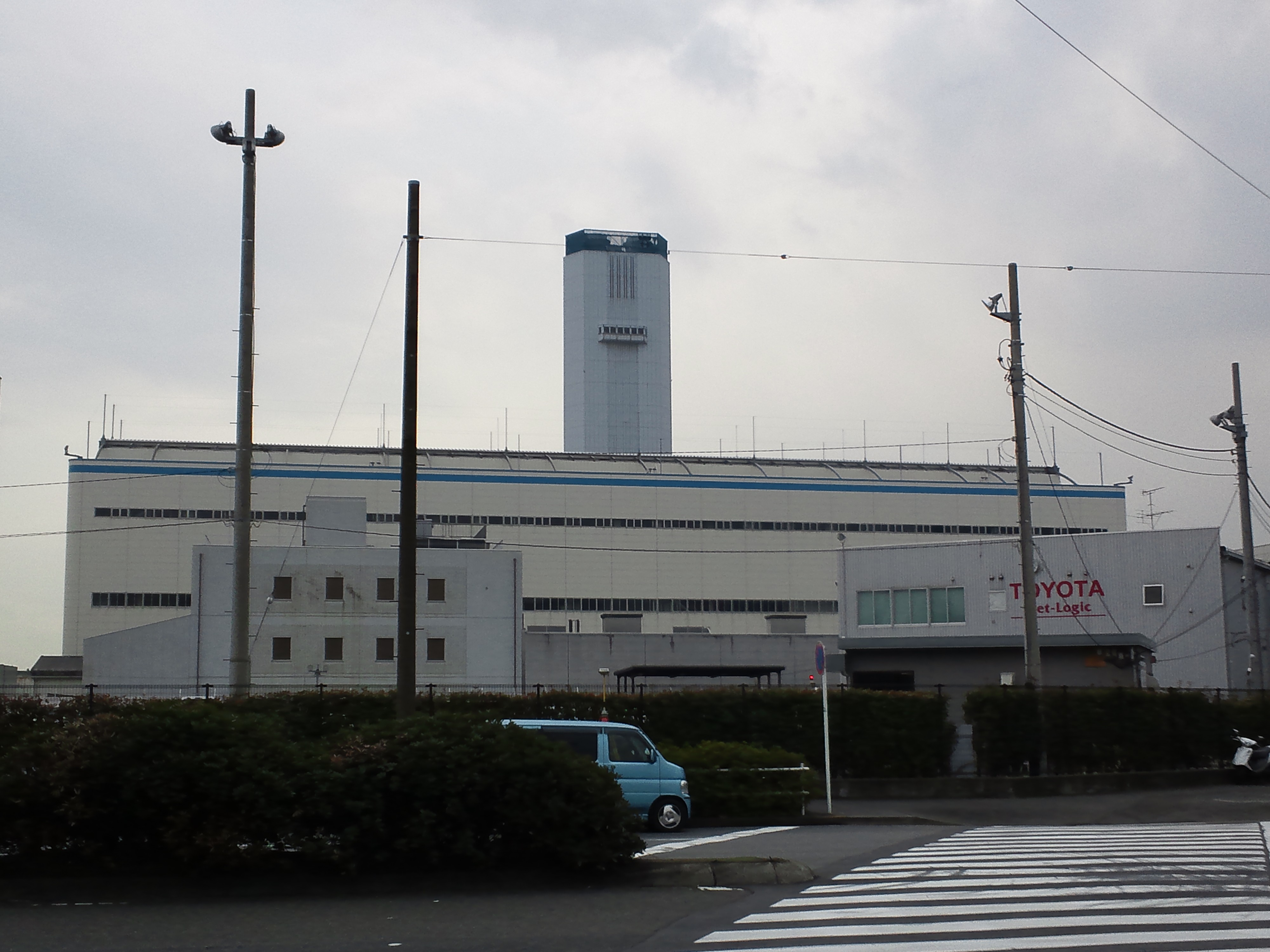 東京電力品川火力発電所